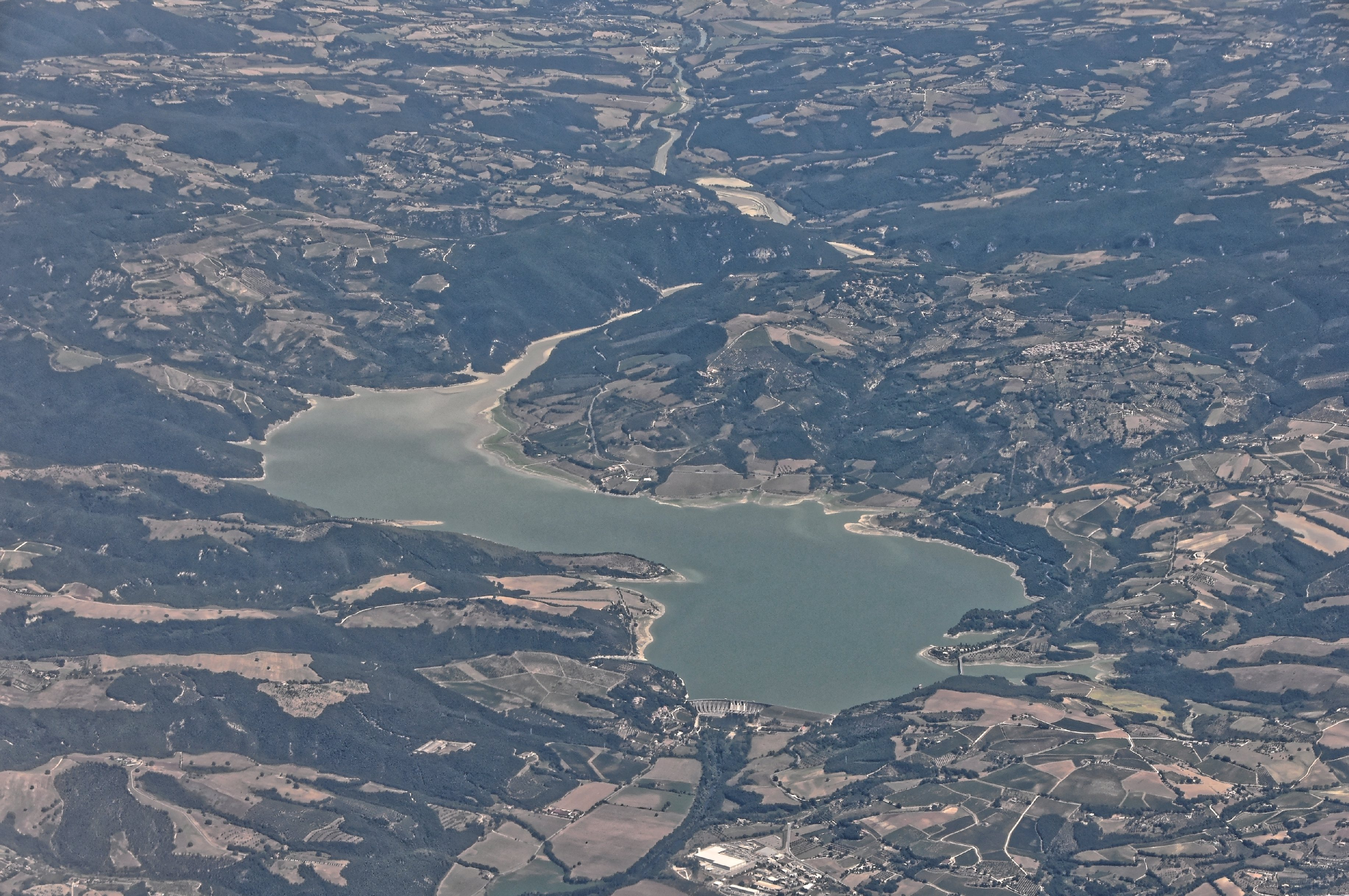 Bilder vom Flug -Rom-Düsseldorf-Hamburg 2013 Dieses Foto entstand in Zusammenarbeit mit Stadtbesichtigungen.de Die Seiten Stadtbesichtigungen.de, der dazugehörige Reise Blog sowie die Facebookseite: Stadtbesichtigungen Rom dürfen dieses Bild für Ihre Veröffentlichungen ohne den Hinweis auf Wikipedia, Commons bzw der Lizenz verwenden. Die Verantwortlichen habe von mir (Ra Boe) die Originaldaten zur freien Verfügung übermittelt bekommen.